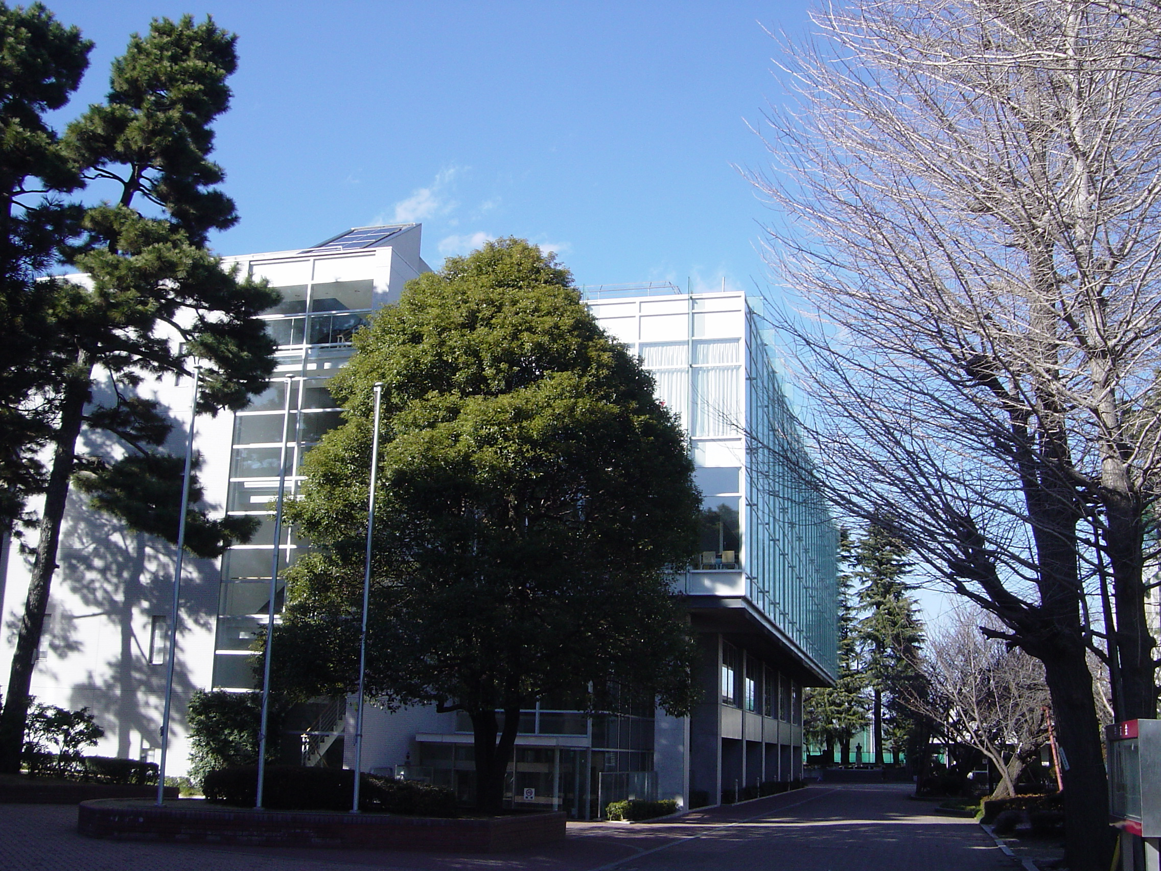 高千穂大学新1号館(2015年7月投稿者による撮影) Category:大学の画像